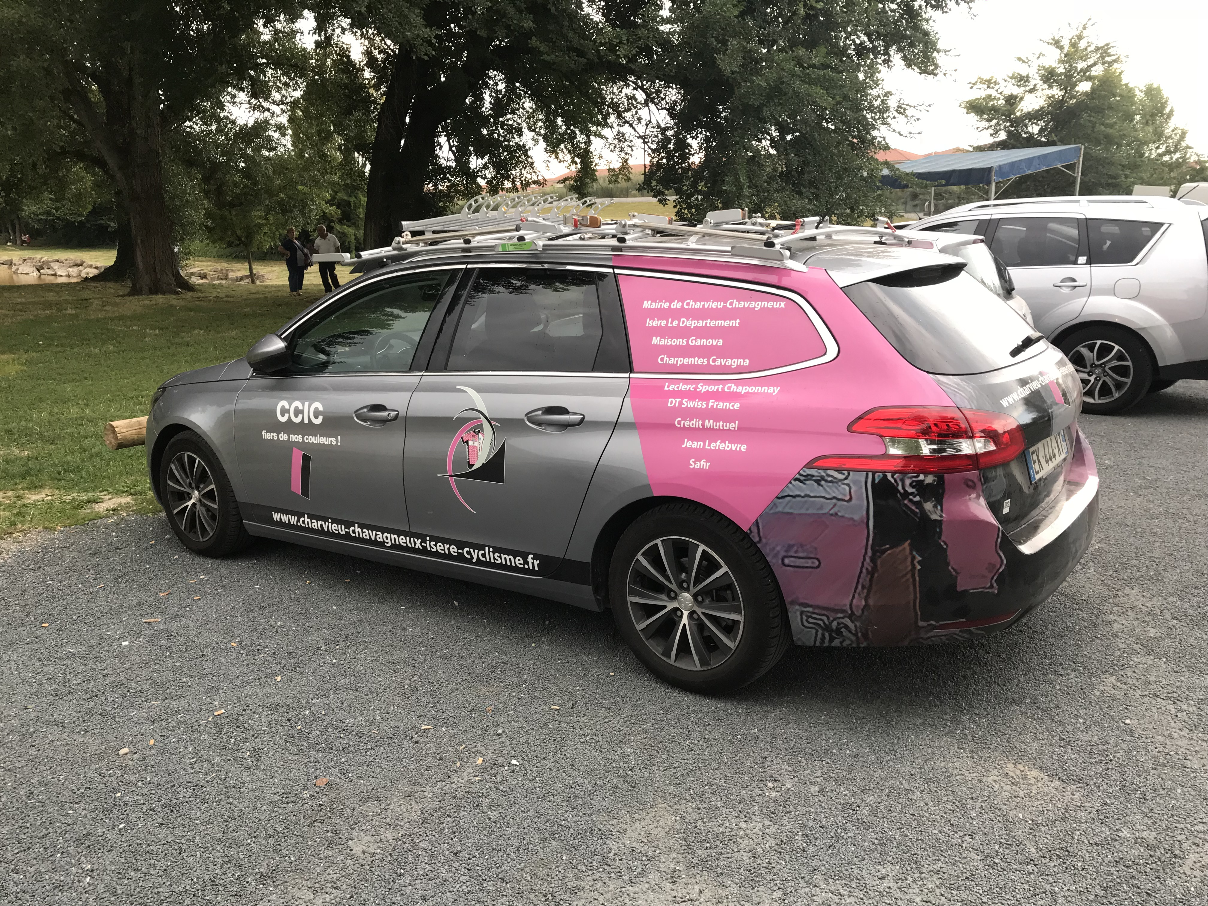 Grand Prix de Charvieu-Chavagneux 2018.